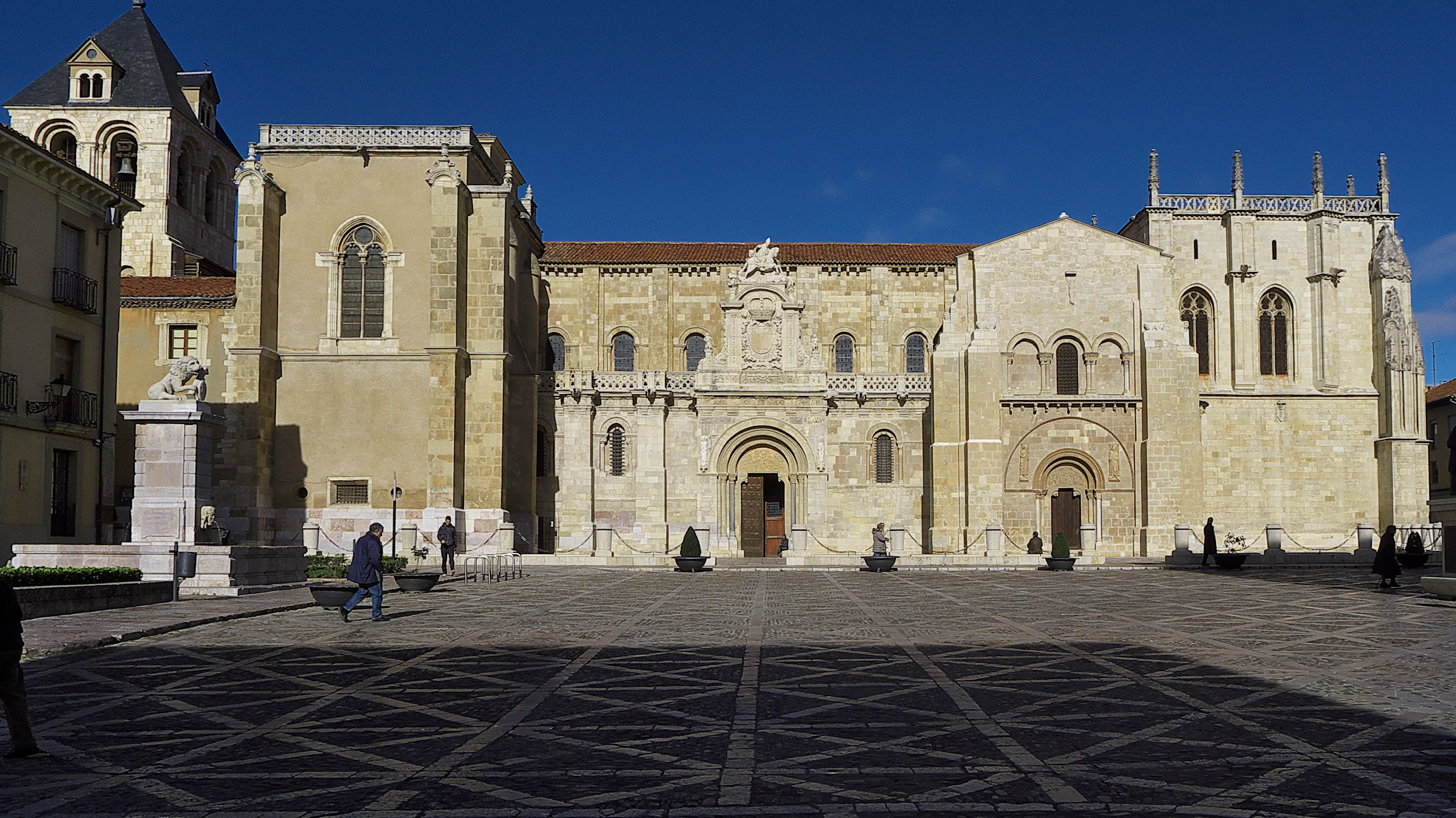 Fachada principal con la Portada de Cordero, puerta de acceso a la iglesia. Refleja las distintas etapas constructivas del histórico y complejo edificio.